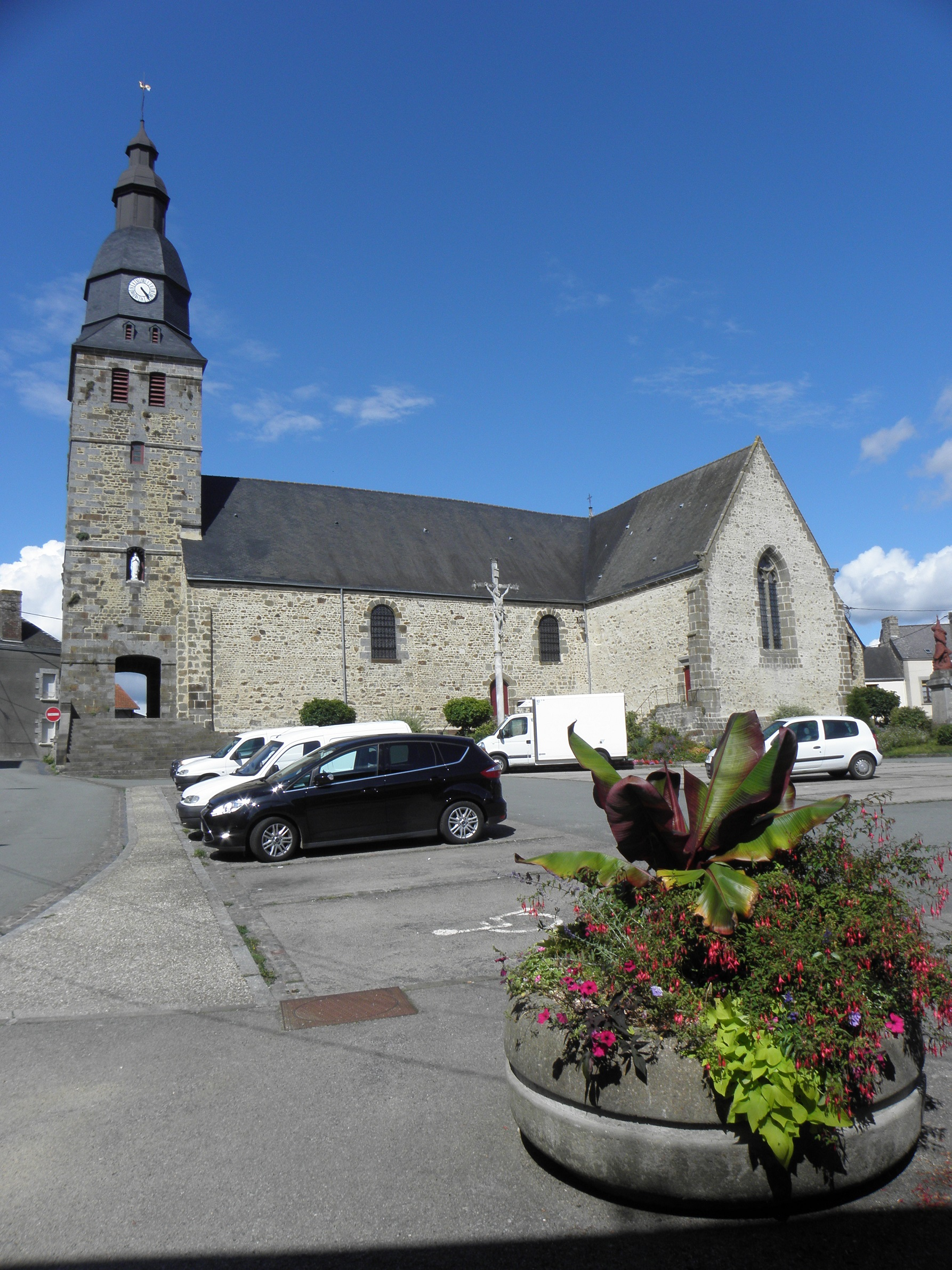 Église Saint-Pierre d'Oisseau (53).